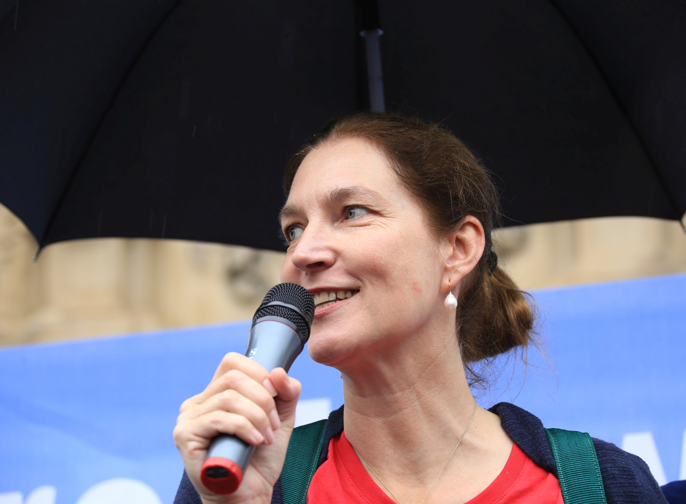 Hedwig Freifrau von Beverfoerde; Demo für alle in Stuttgart am 28.6.2014